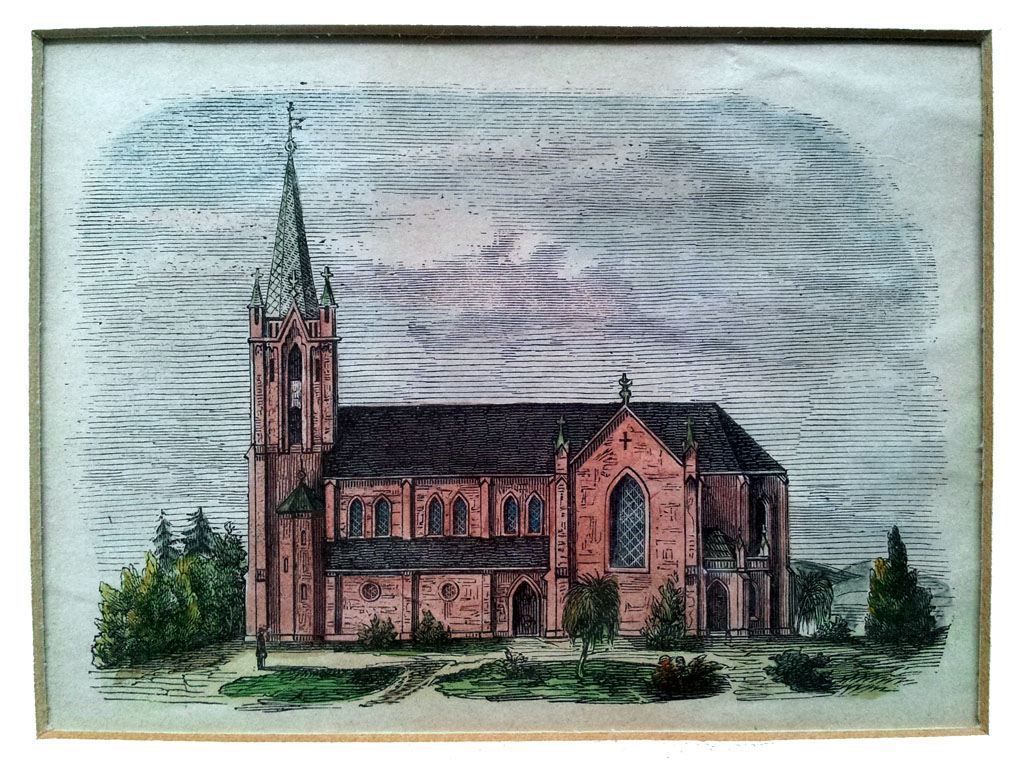 Zeichnung der evangelischen Kirche in Meppen. Originalgröße 10x7,2 cm.